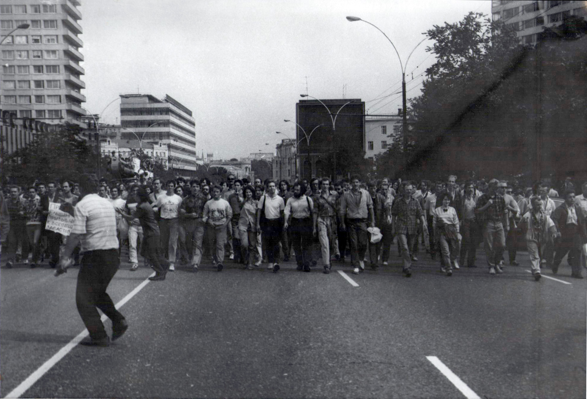 Москва, проспекта Калинина. Марш от Кремля к Белому дому, 19 августа 1991 года.